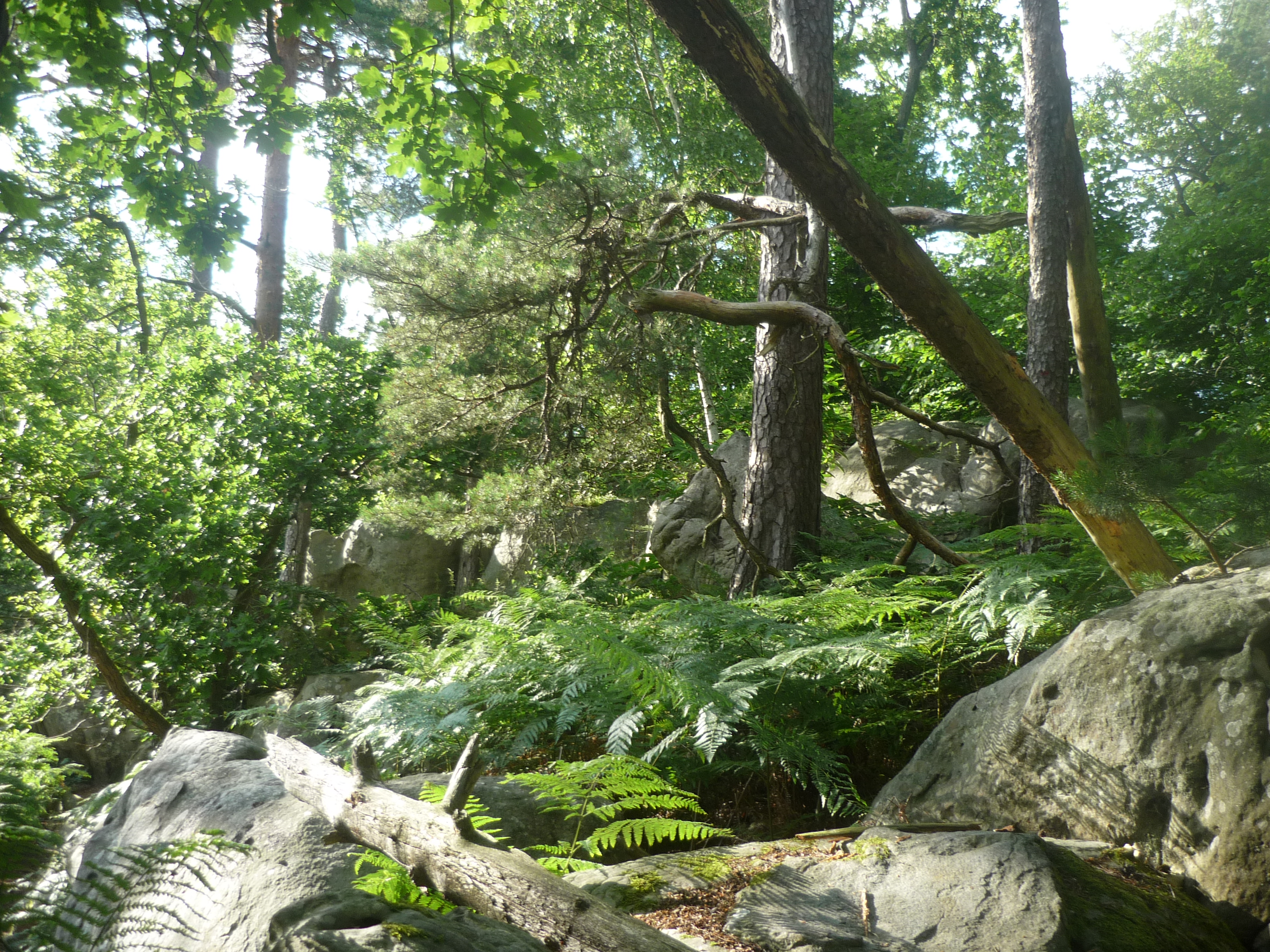 Vue prise en forêt